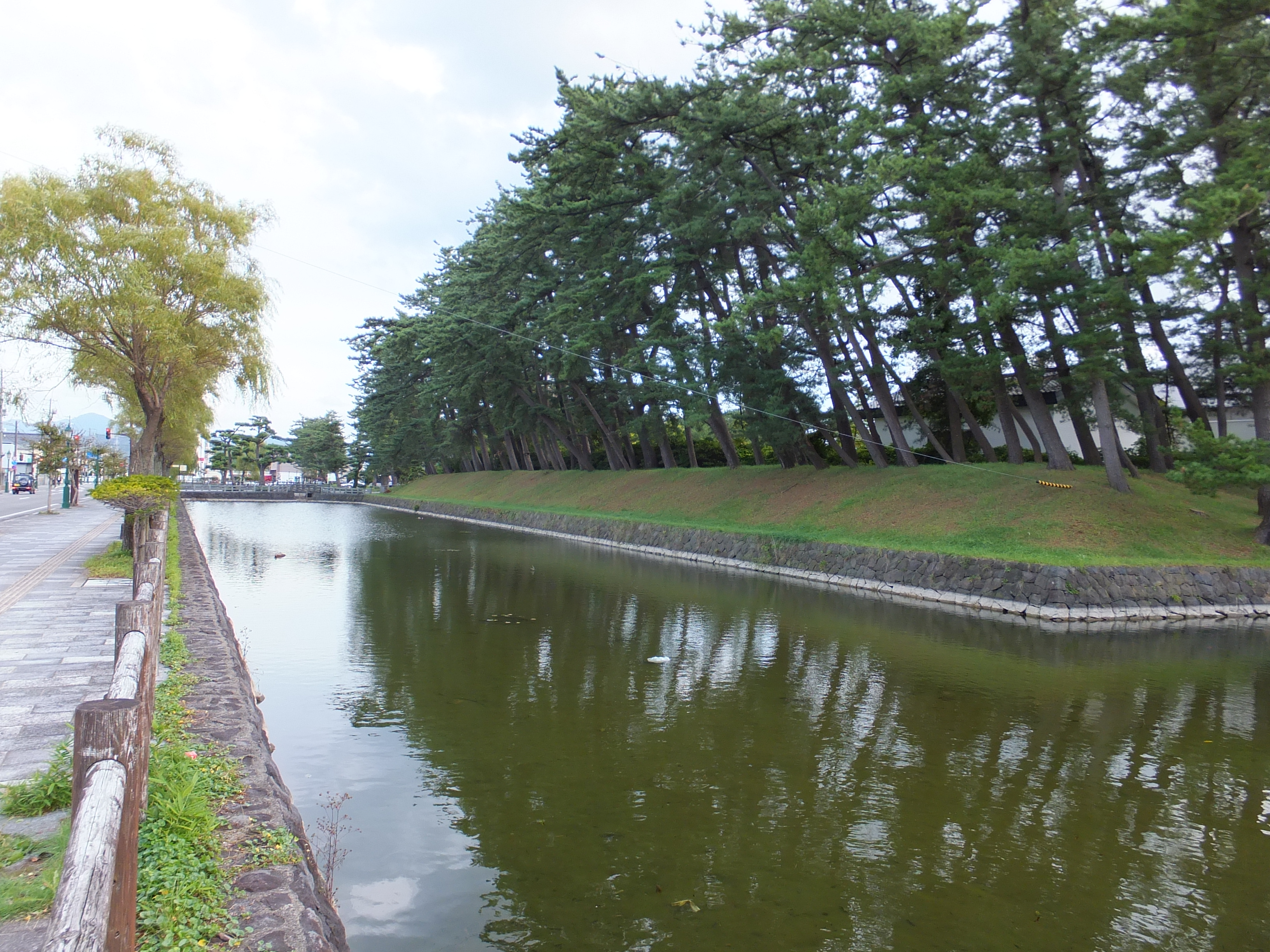 本荘城（秋田県由利本荘市）の堀。城域は現在由利本荘市役所と本荘公園として整備されている。